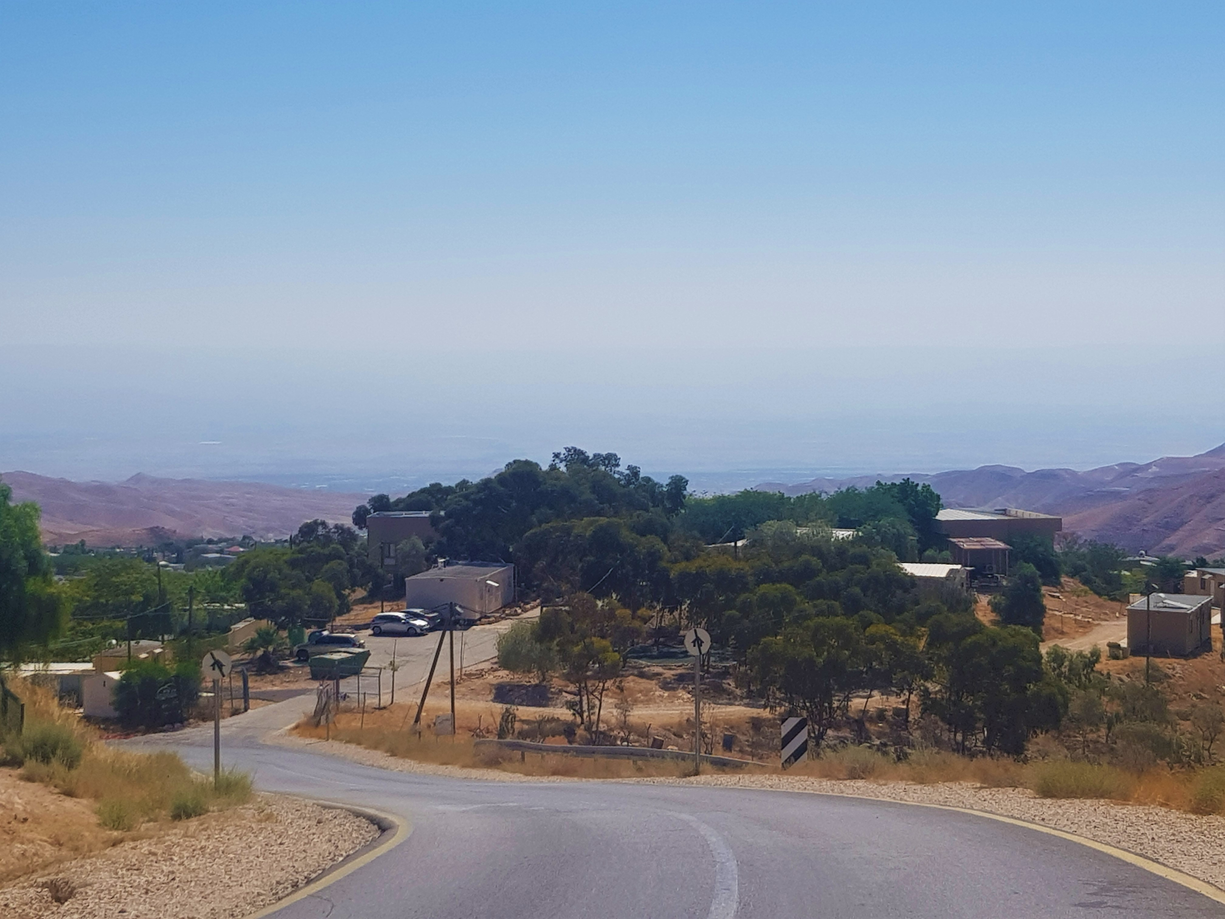 המכינה הקדם צבאית בכפר אדומים